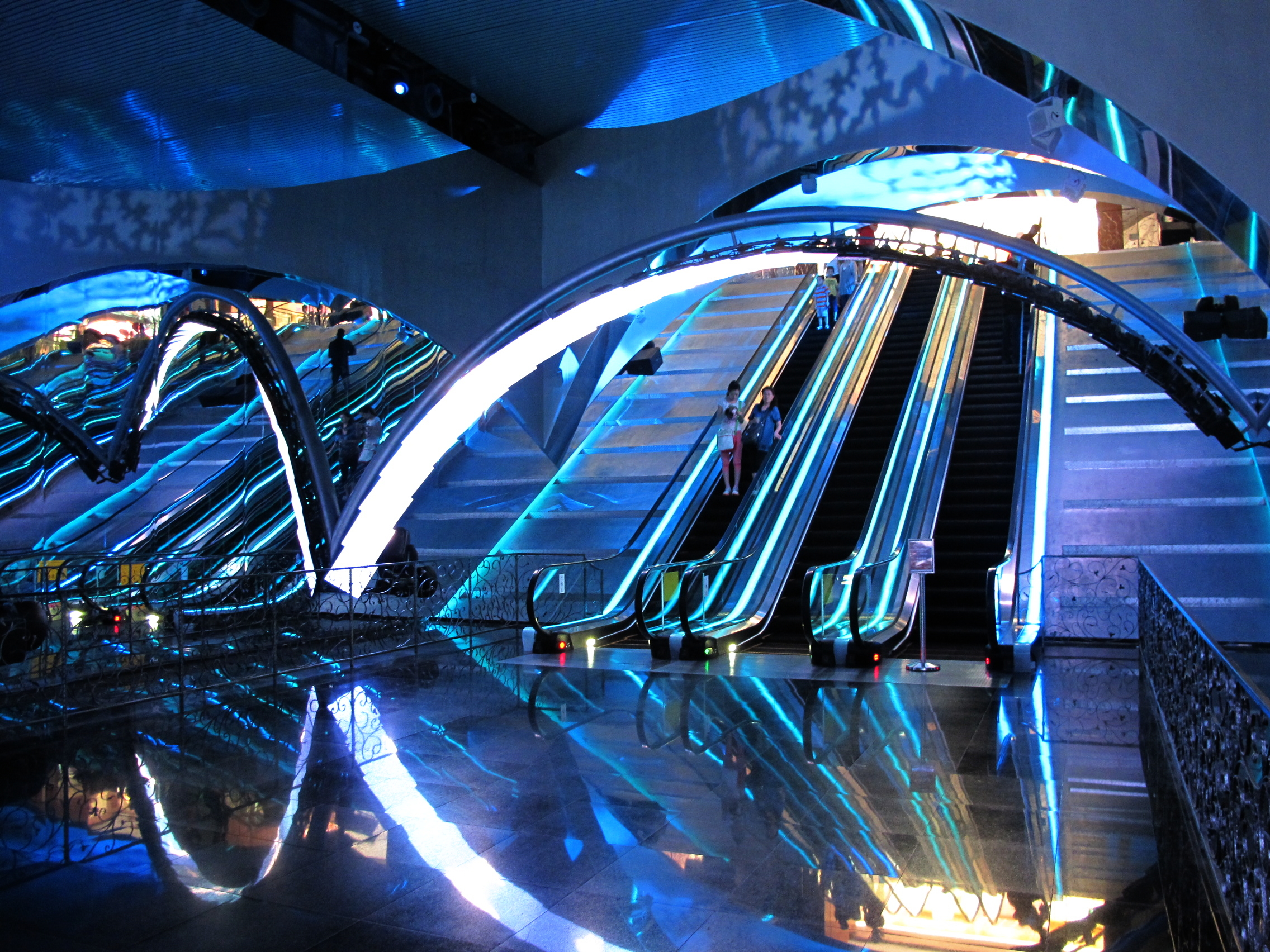 Resorts World Sentosa Escalator